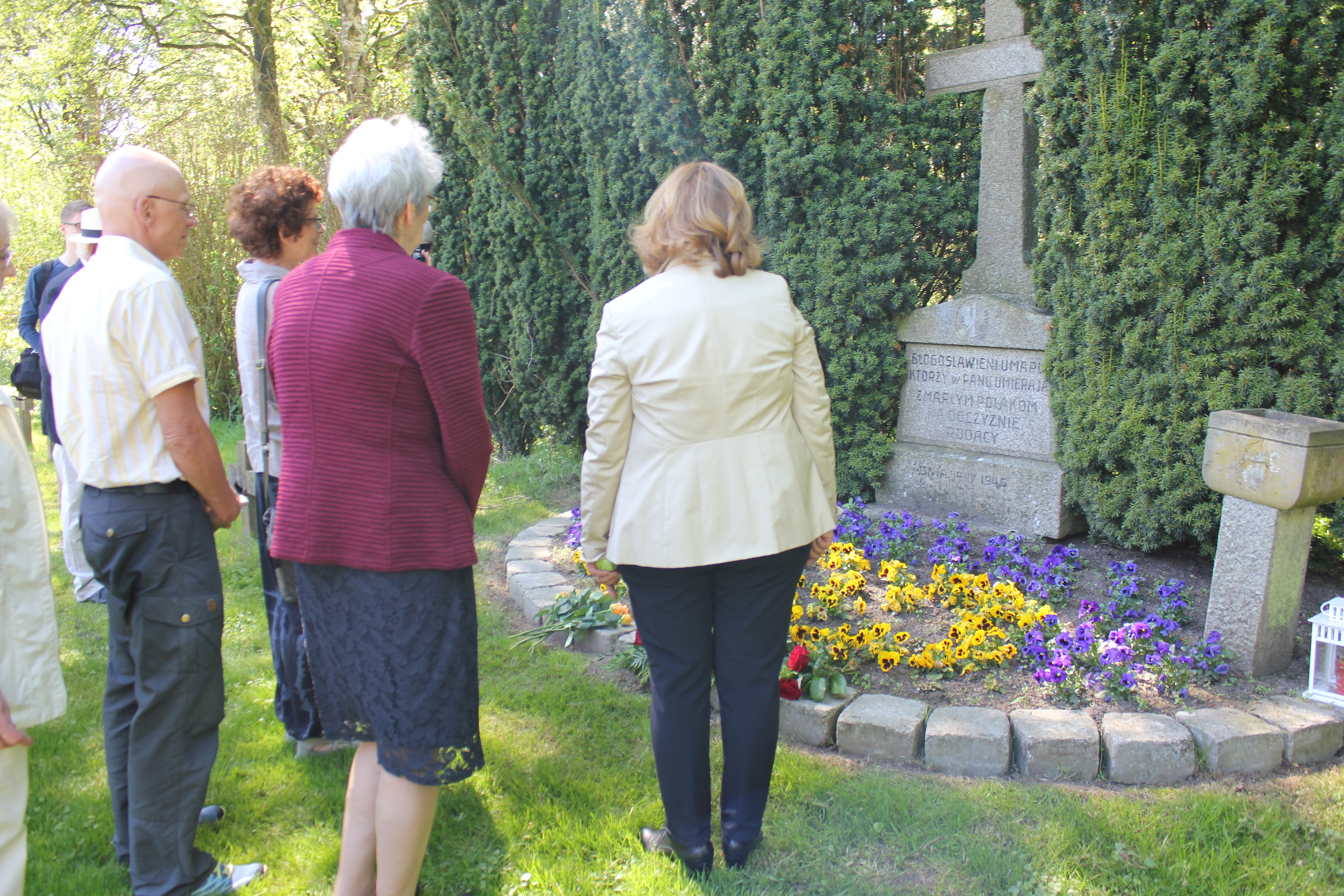 Öffentliches Gedenken am 8. Mai 2018 auf dem Friedhof Friedenshügel, Bild 15